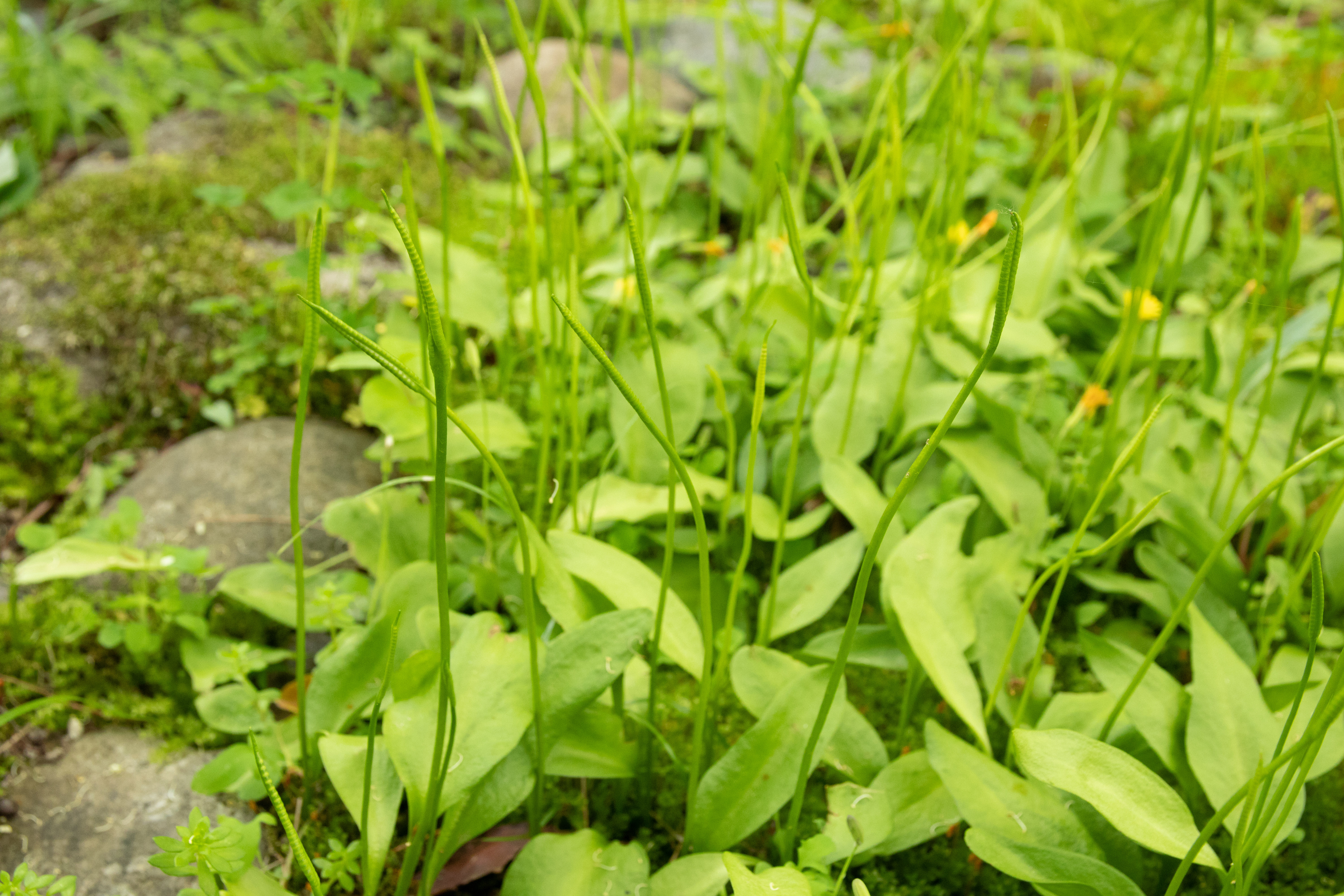 トネハナヤスリ (学名:Ophioglossum namegatae) 撮影地：筑波実験植物園Canon EOS 80D + Sigma 17-70mm F2.8-4 DC Macro OS HSM